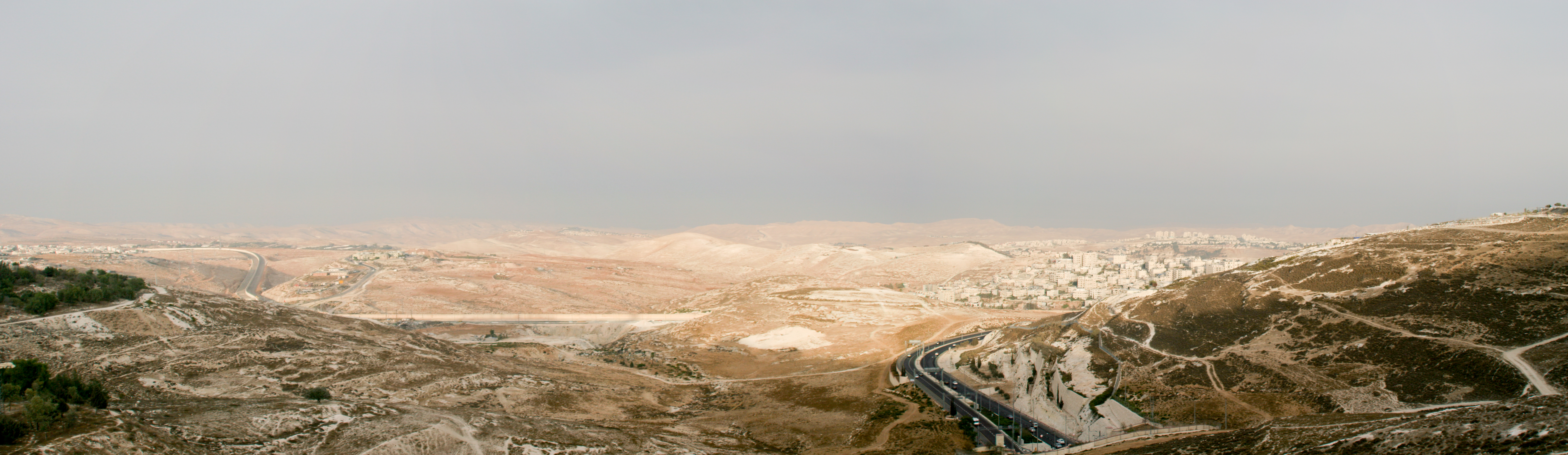 Jerusalem east